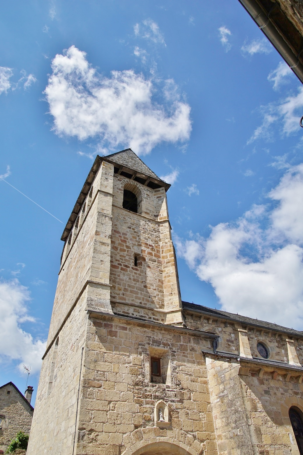 église Saint Julien